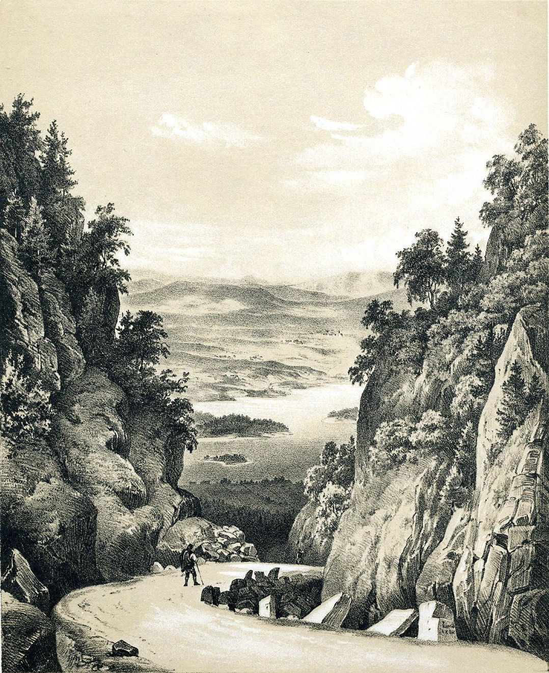 Pictures from the Work "Norge fremstillet i billeder" 1848 by Chr. Tønsberg. Krokkleiva, Rngerike Municipality, Buskerud, Norway.